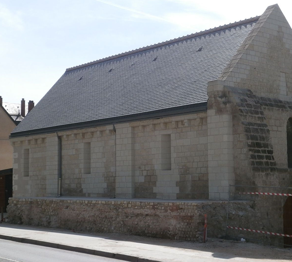 Base de l'enceinte gallo-romaine du castrum de l'ancien Tours (Indre-et-Loire), sur laquelle repose la façade nord de la chapelle Saint-Libert.